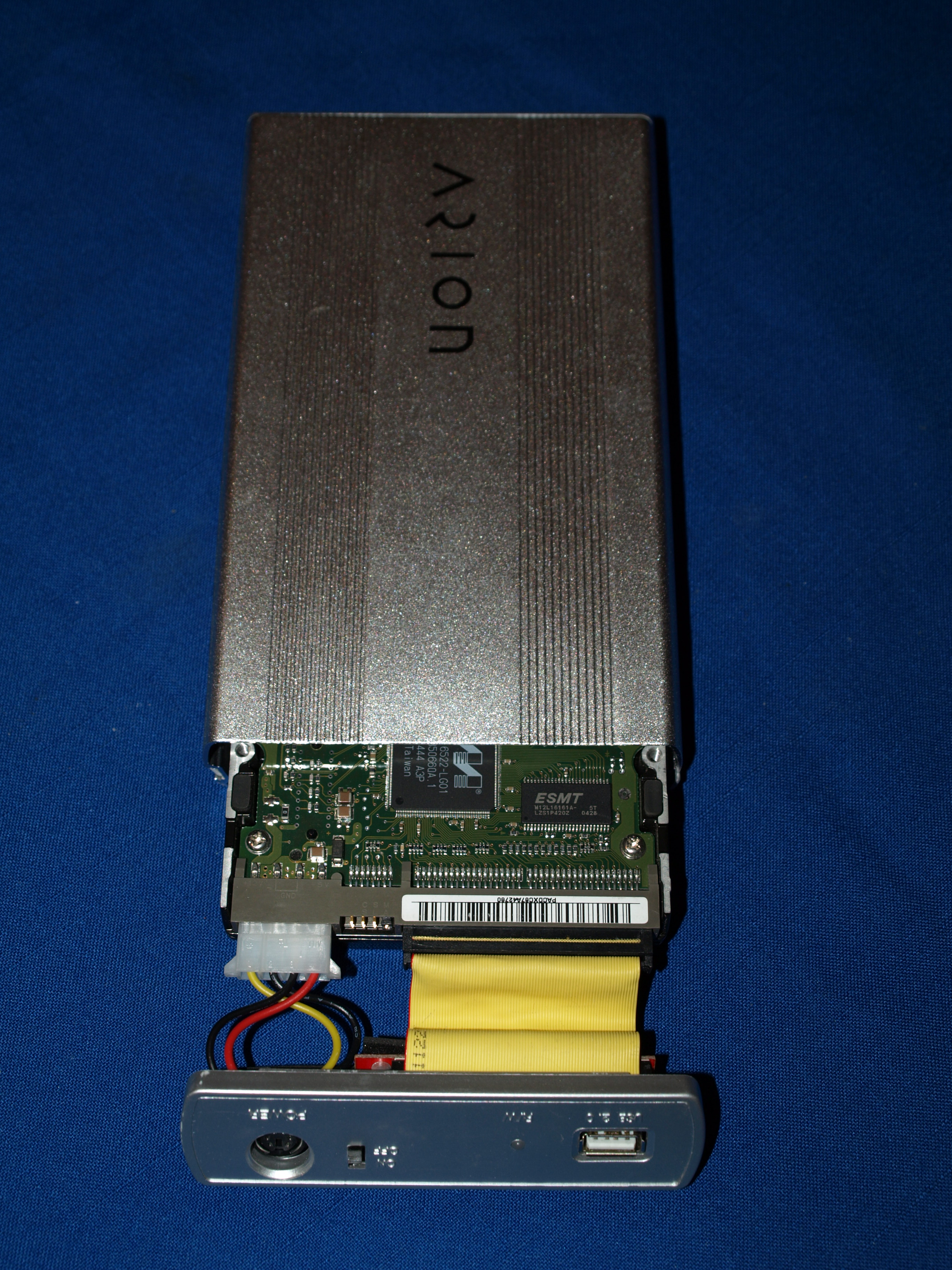 Rack para Disco Duro